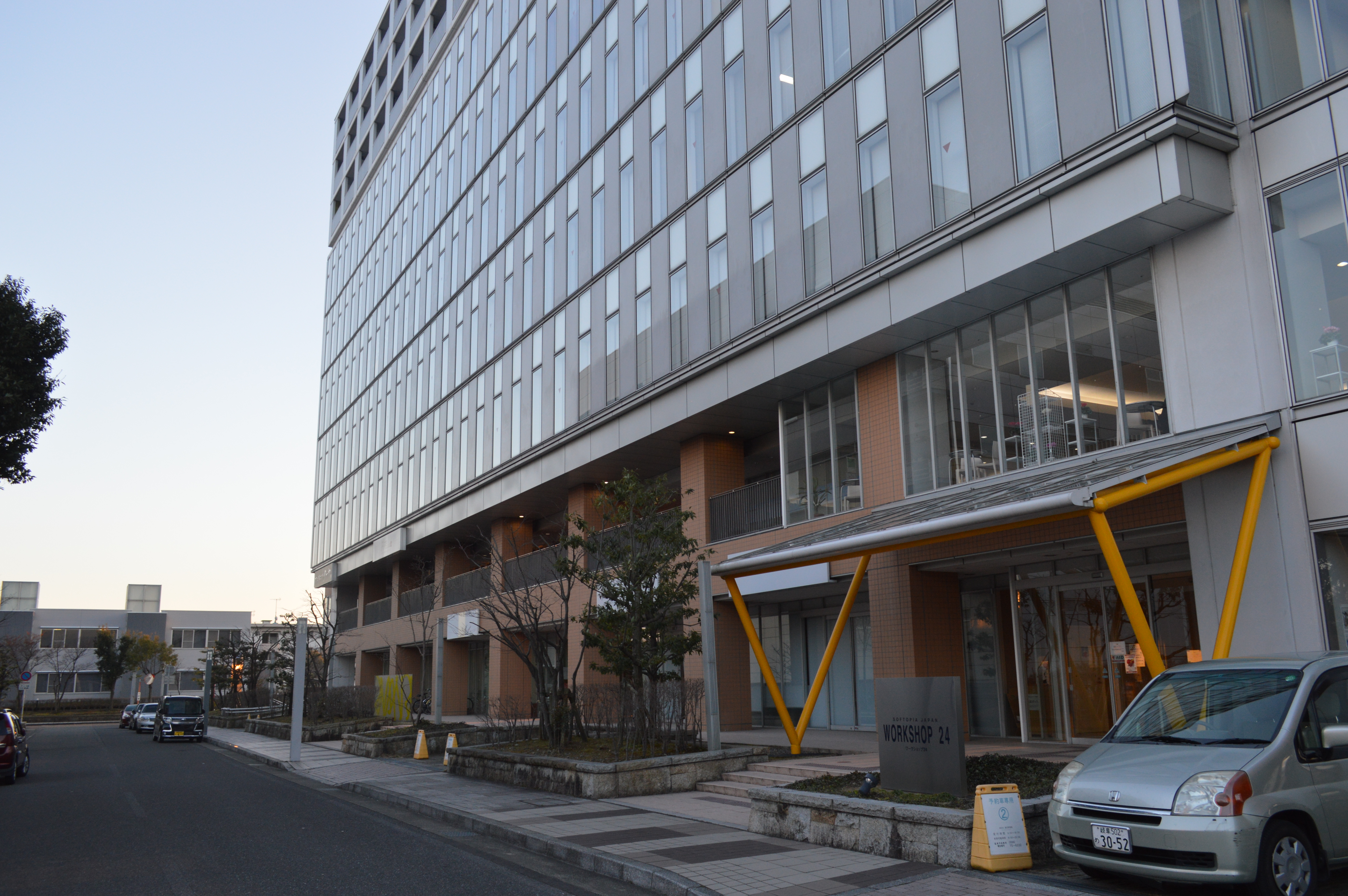 岐阜県大垣市のソフトピアジャパン ワークショップ24。会議室や技術開発室、情報科学芸術大学院大学(IAMAS)やその附属図書館などが入っている。